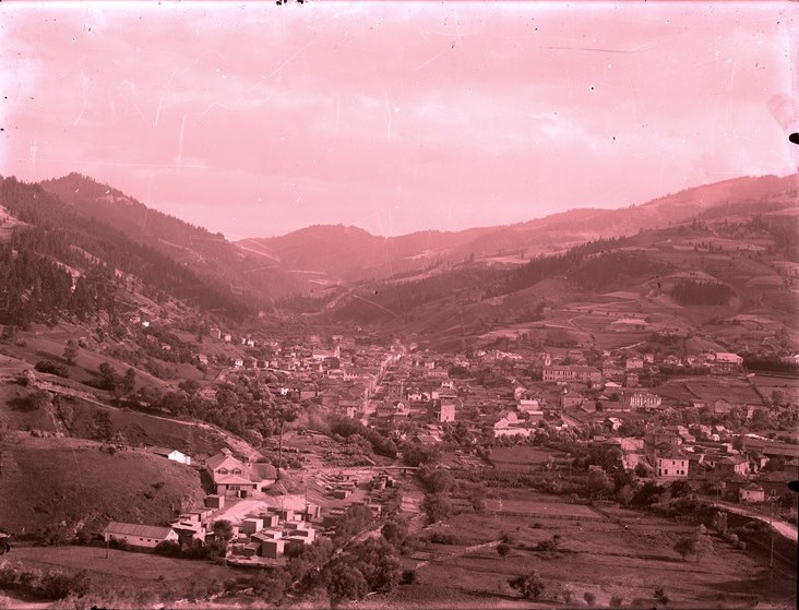 Общ изглед от Чепеларе, 1930 г.